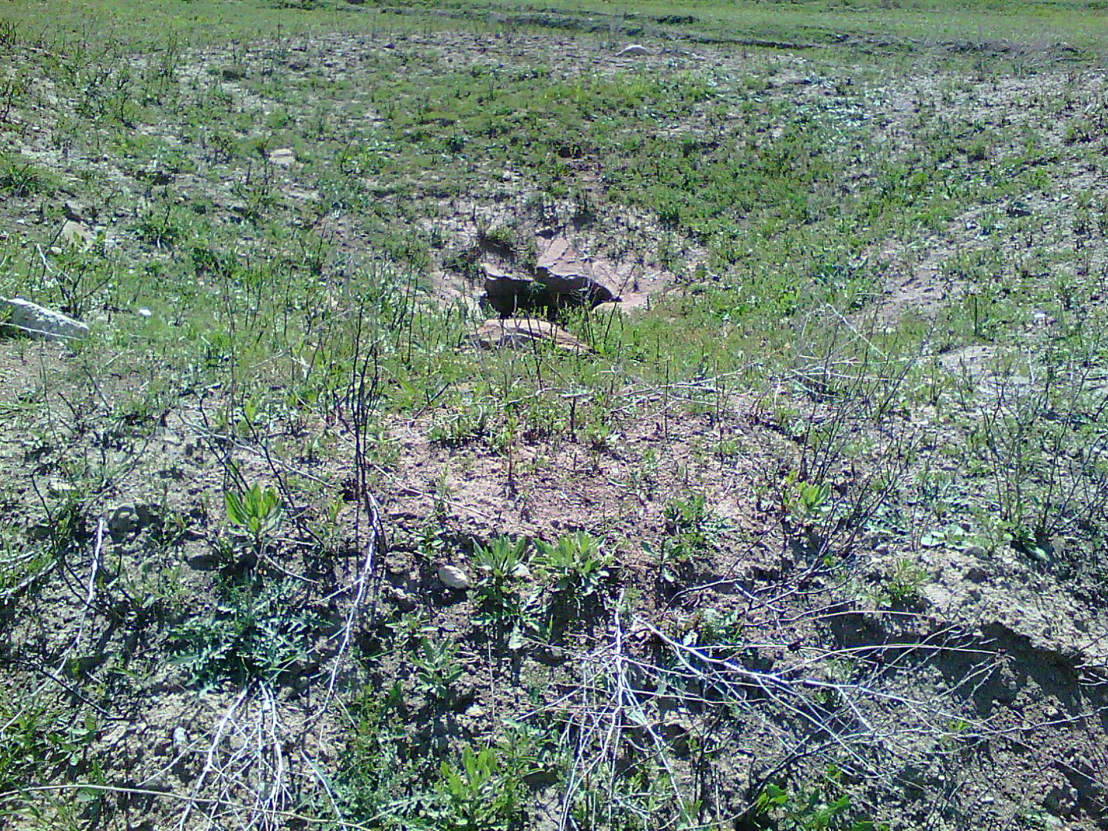 بقایای یک چاه آب (قنات) در ماد باستان